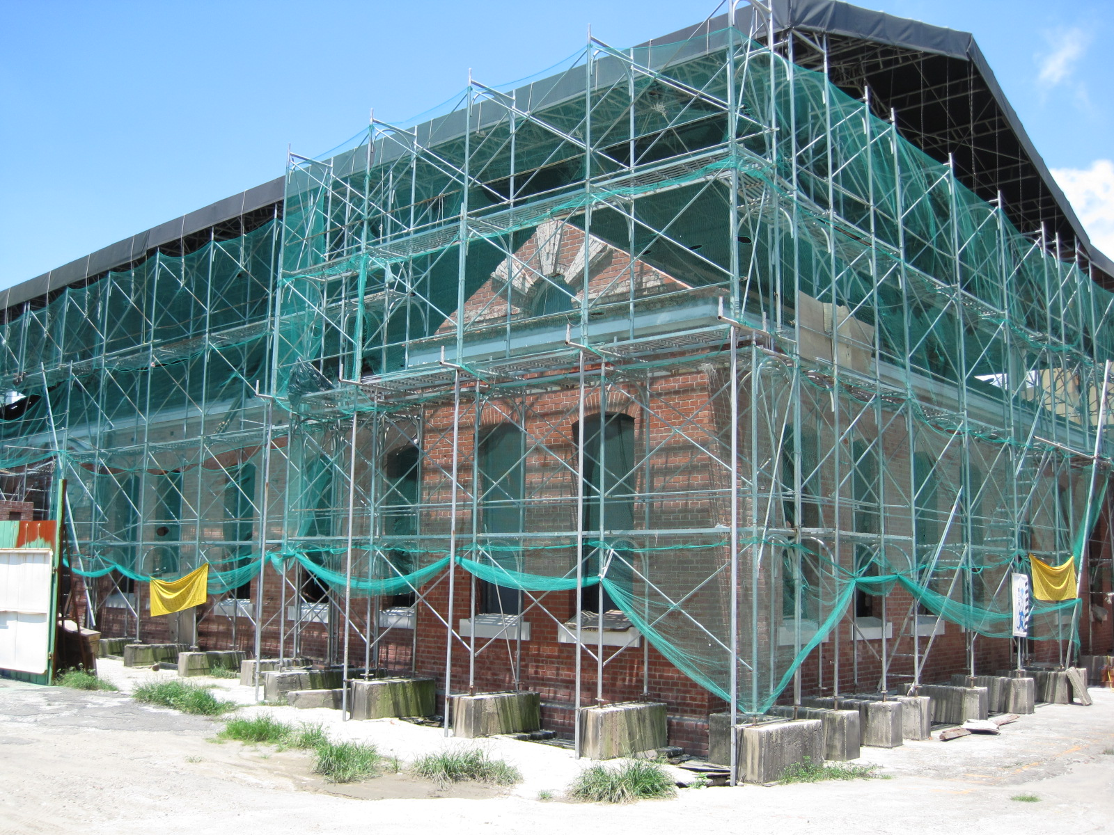 原台灣總督府專賣局台南支局台南出張所